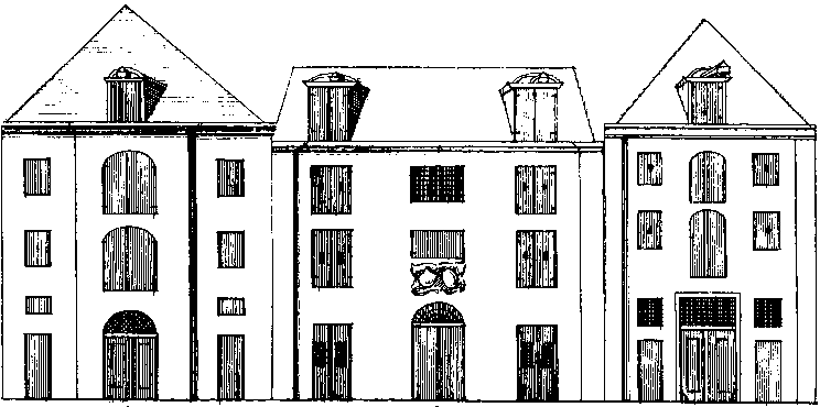 Tekening van de koetshuizen Keizersgracht 633, 635 en 637 uit het Grachtenboek van Caspar Philips (1771). BMA maakt geen bezwaar tegen hergebruik als haar naam wordt vermeld.